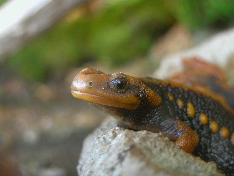 Krokodilmolch (Tylototriton verrucosus) im Exotarium/Frankfurter Zoo. Aufgenommen mit einer Nikon Coolpix 5700.